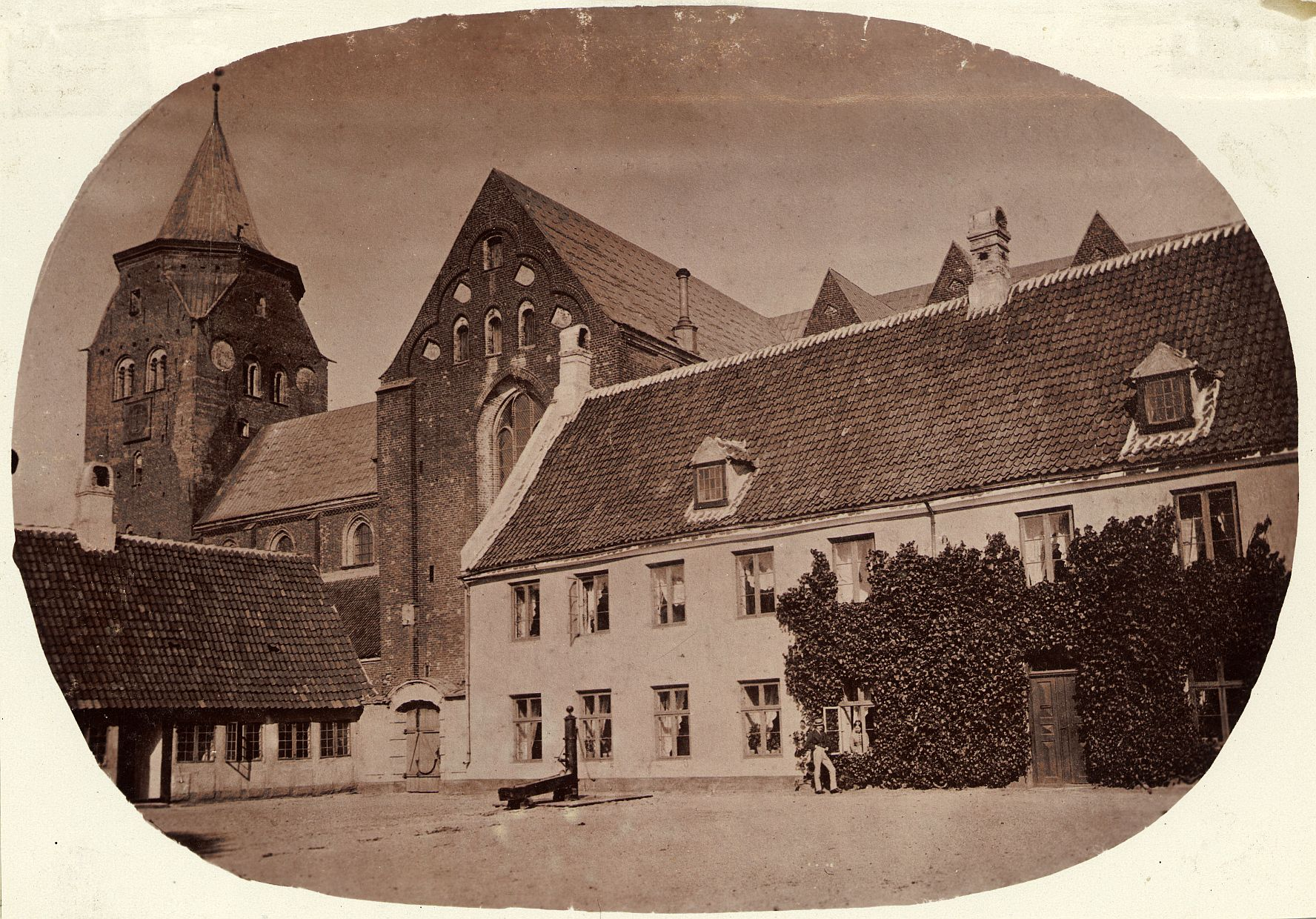 Aarhus Bispegård, ca. 1865